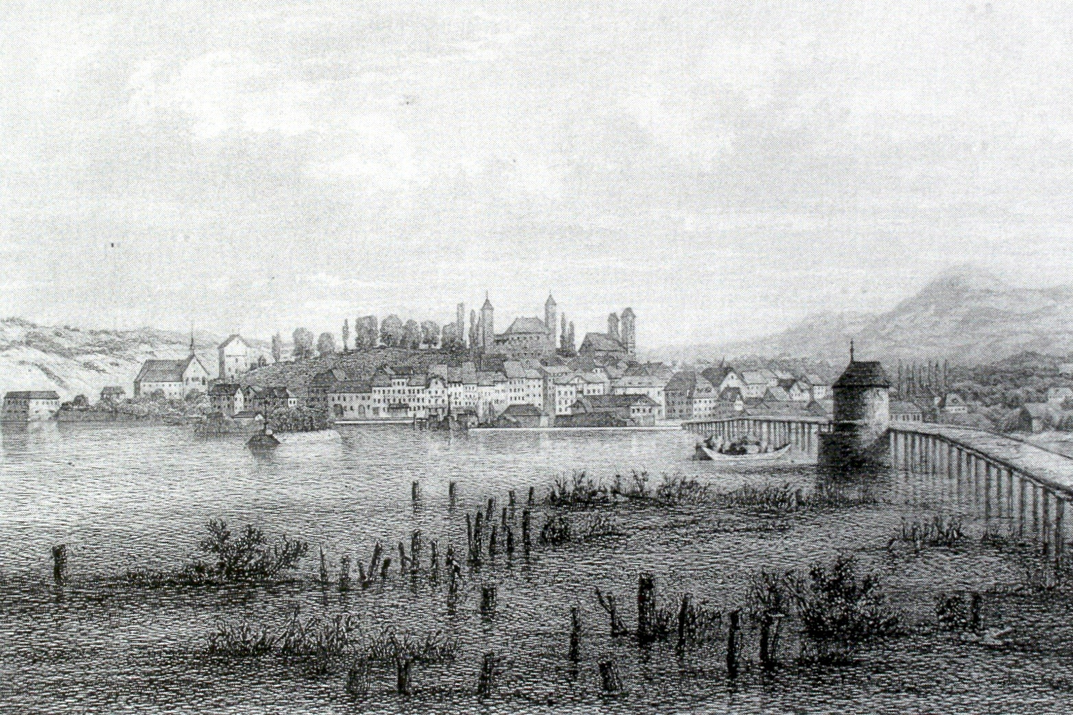 «Rappersweil», Stahlstich von Rudolf Ringger aus dem «Album vom Zürichsee», um 1865, 8x11 cm